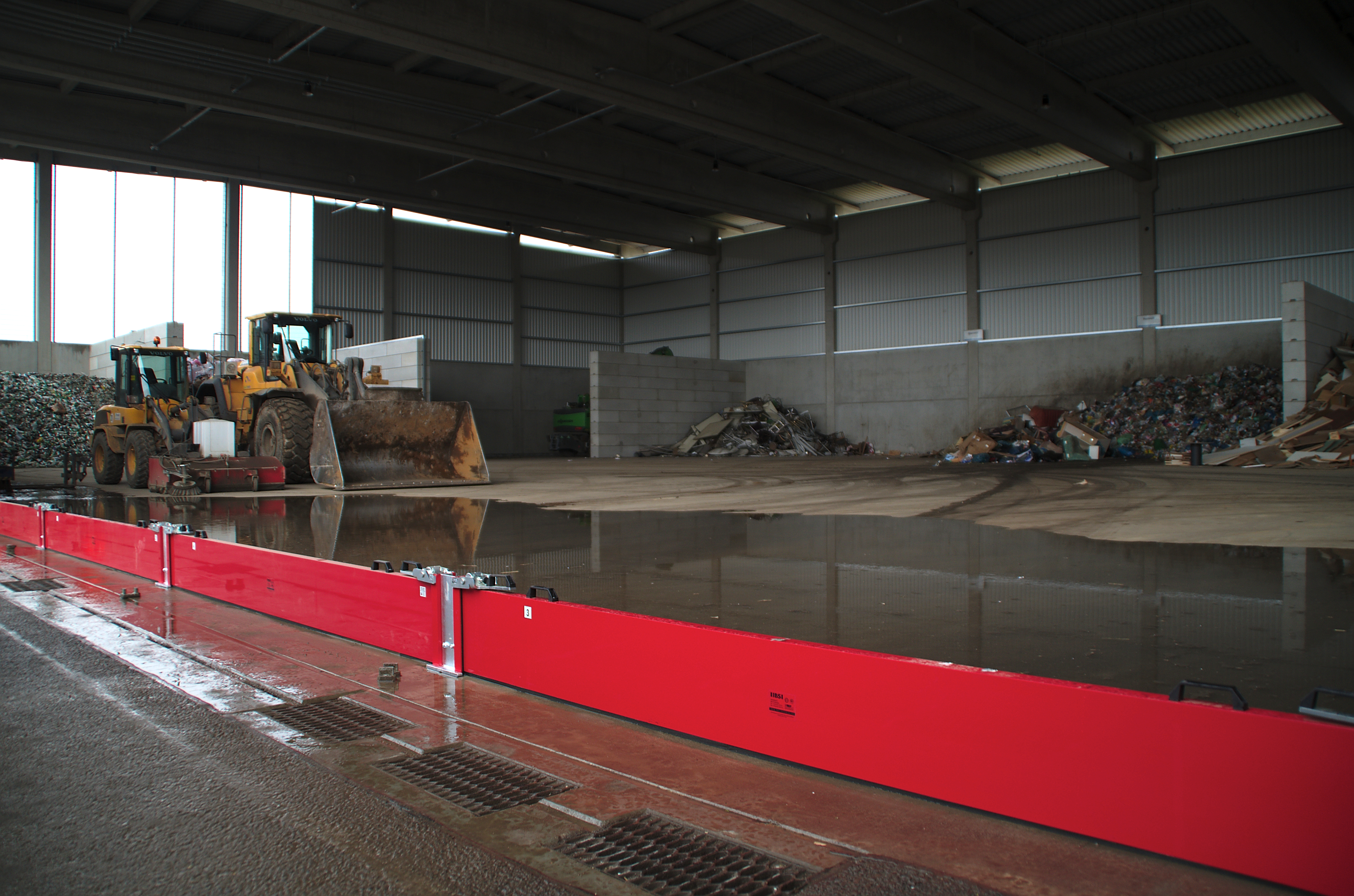 Manuelle Löschwasserbarriere